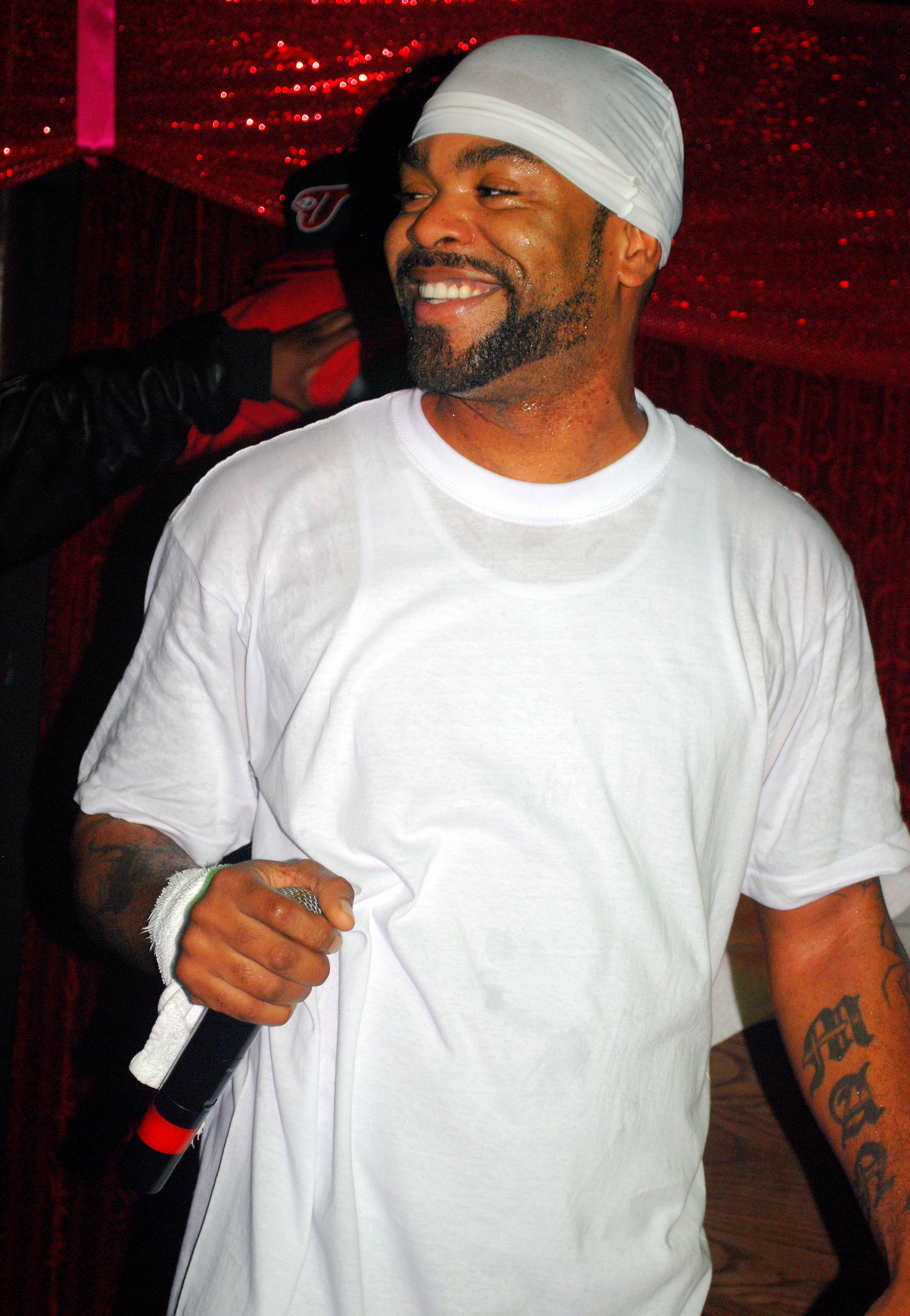 Method Man